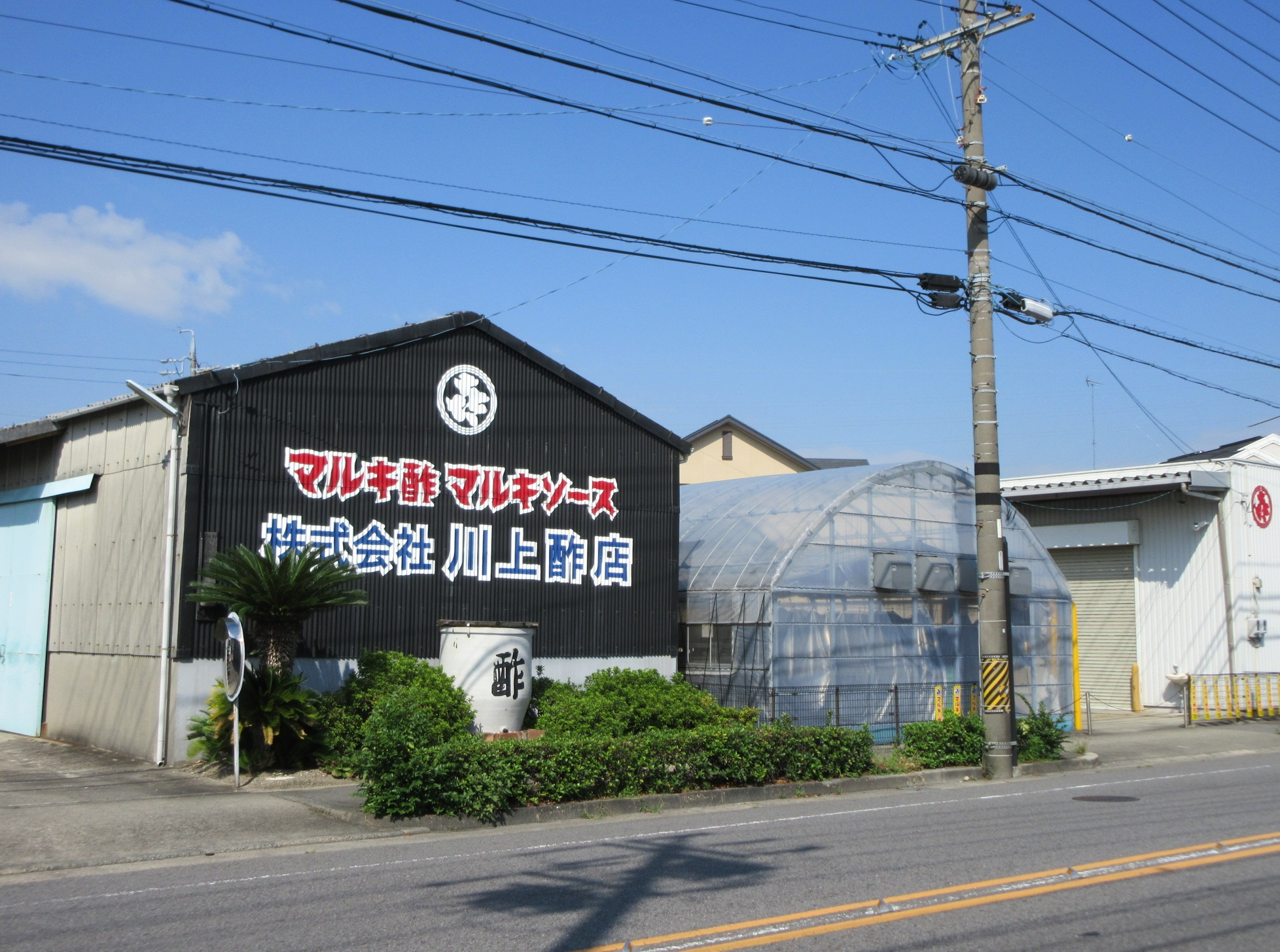 株式会社川上酢店（岡崎市日名本町）